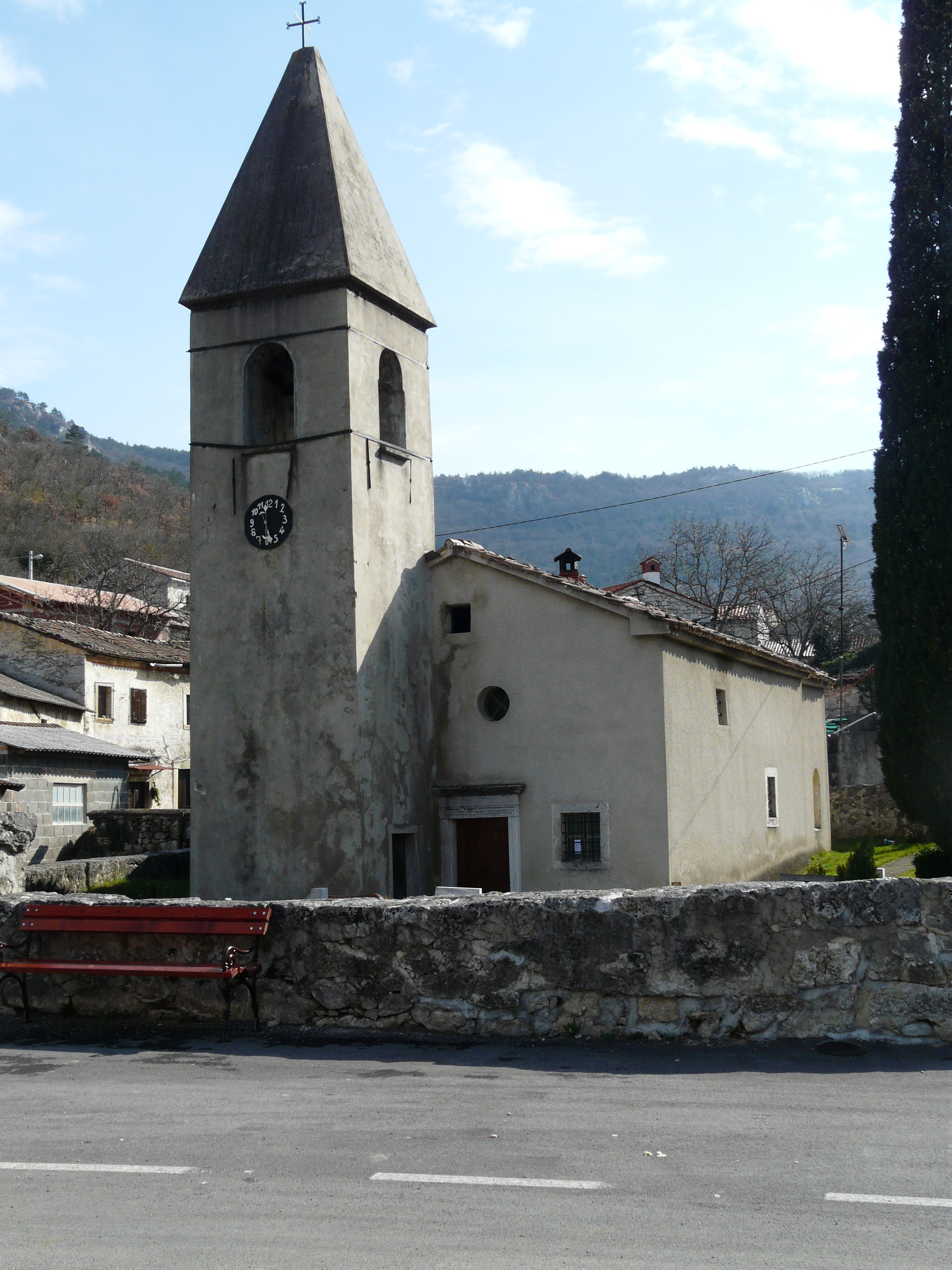 Cerkev sv Martina pred obnovo leta 2014.